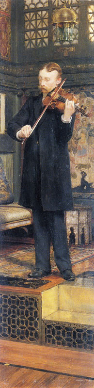 Лоуренс Альма-Тадема. Портрет Мориса Сонса, играющего на скрипке в студии художника